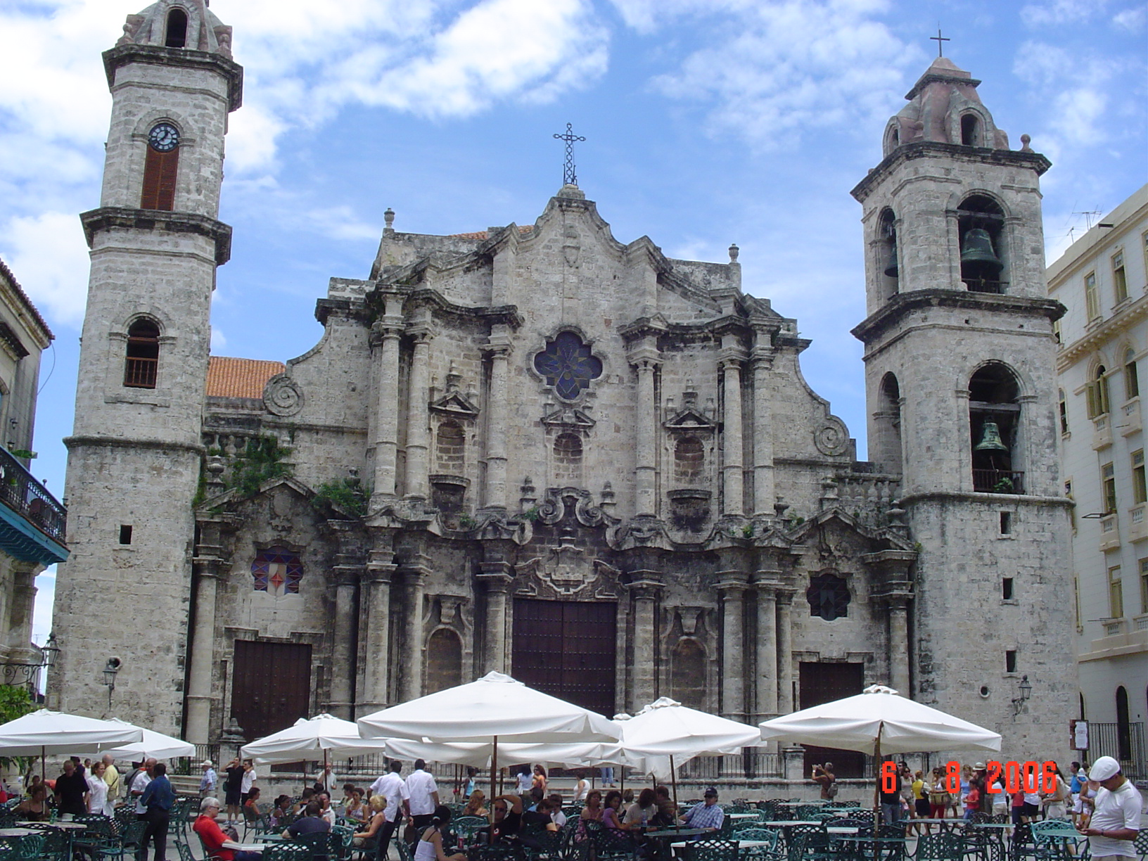 CUBA - Havana - Catedral